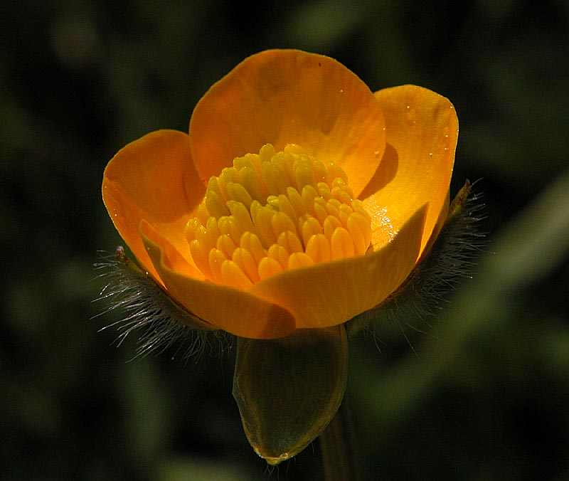 Scharfer Hahnenfuß (Ranunculus acris), aufgenommen in Buseck